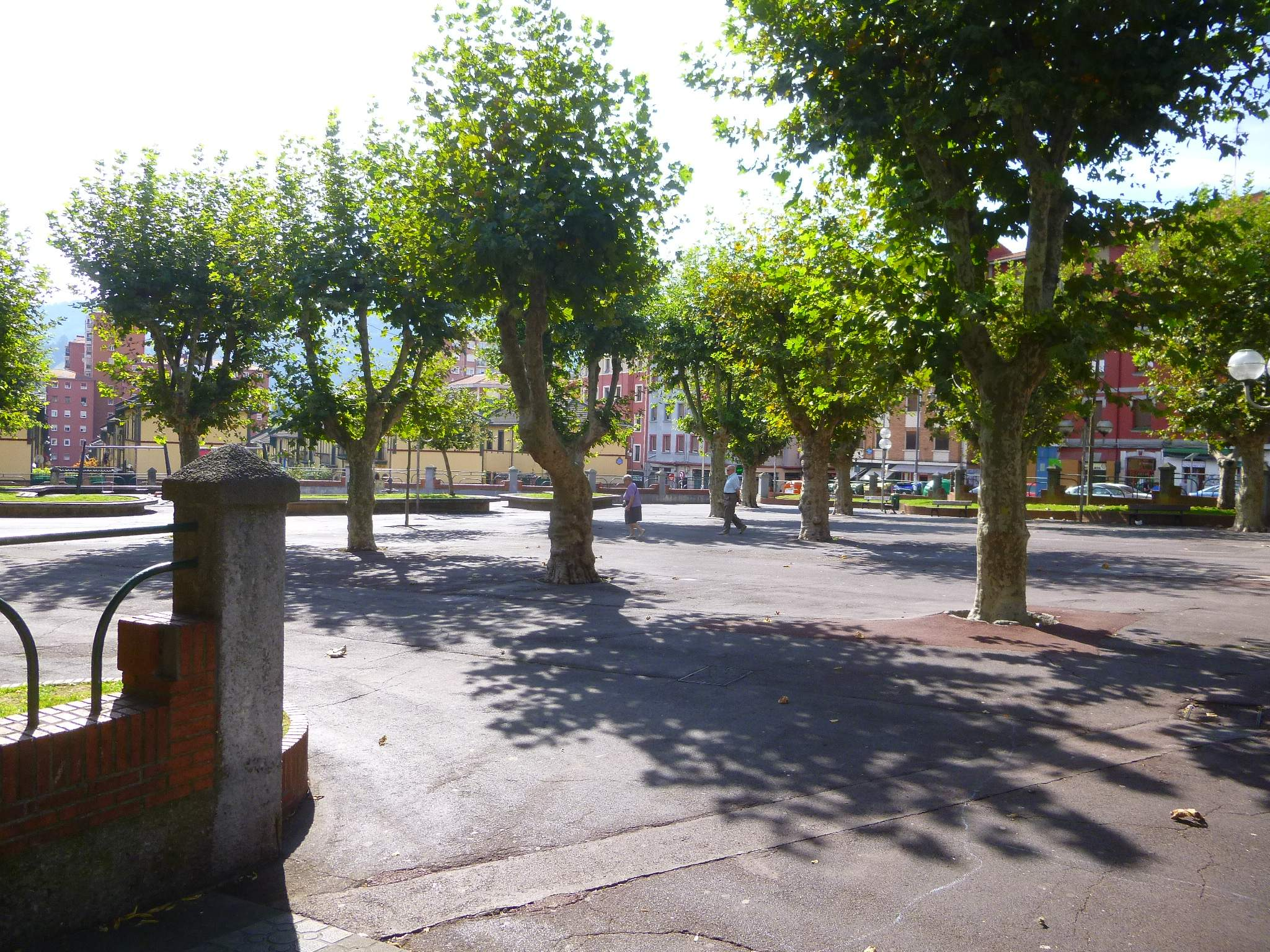 Bilbao - barrio de Santutxu